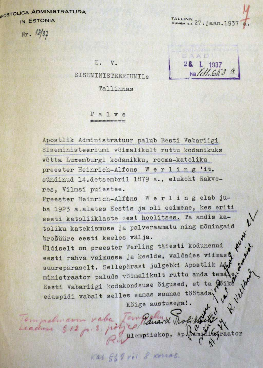 Eesti Apostelliku Administratuuri palve Henri Werlingi kodakondsuse asjus